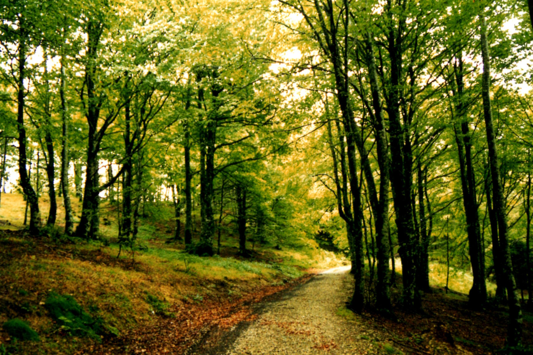 Puerto de Urkiaga. De Eugi a St Etienne. GR11. 1998